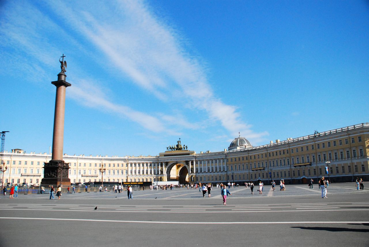 Palace Square, Saint Petersburg